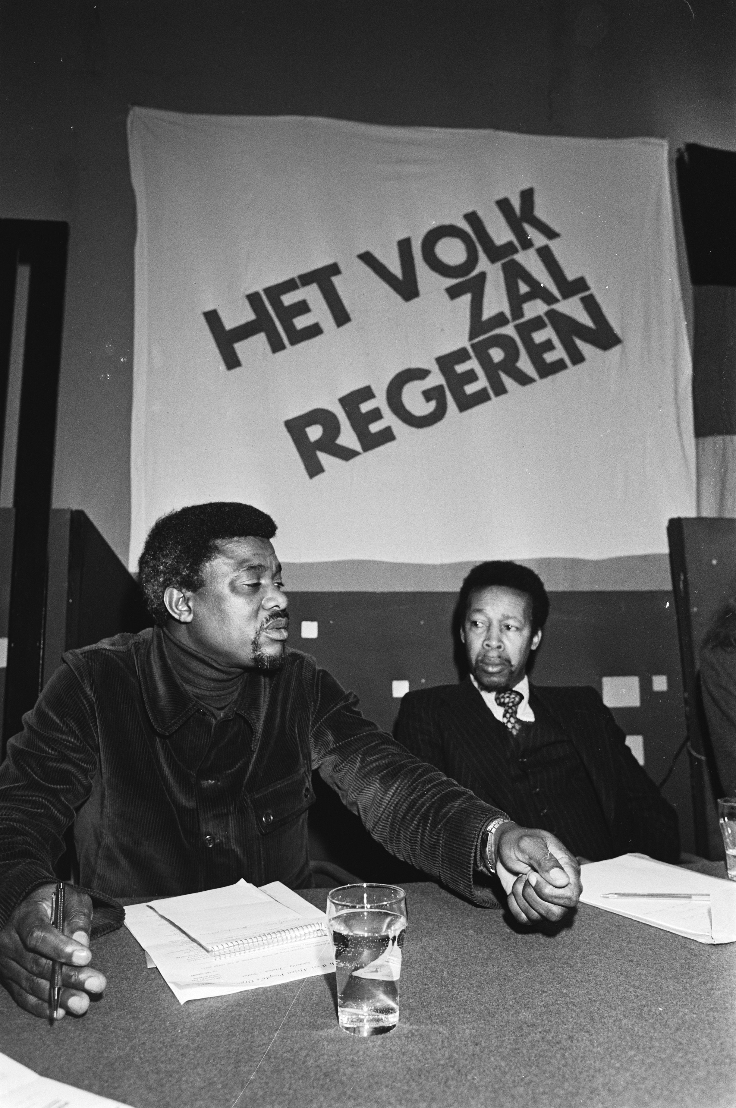 Forum in Amsterdamse "De Populier", "Stem nu voor vrijheid in Zuidelijk Afrika", Motsipe (ANC) Kaukungua (vrijheidsbeweging SWAPO). Spandoek: "Het volk zal regeren". Datum 29 maart 1981